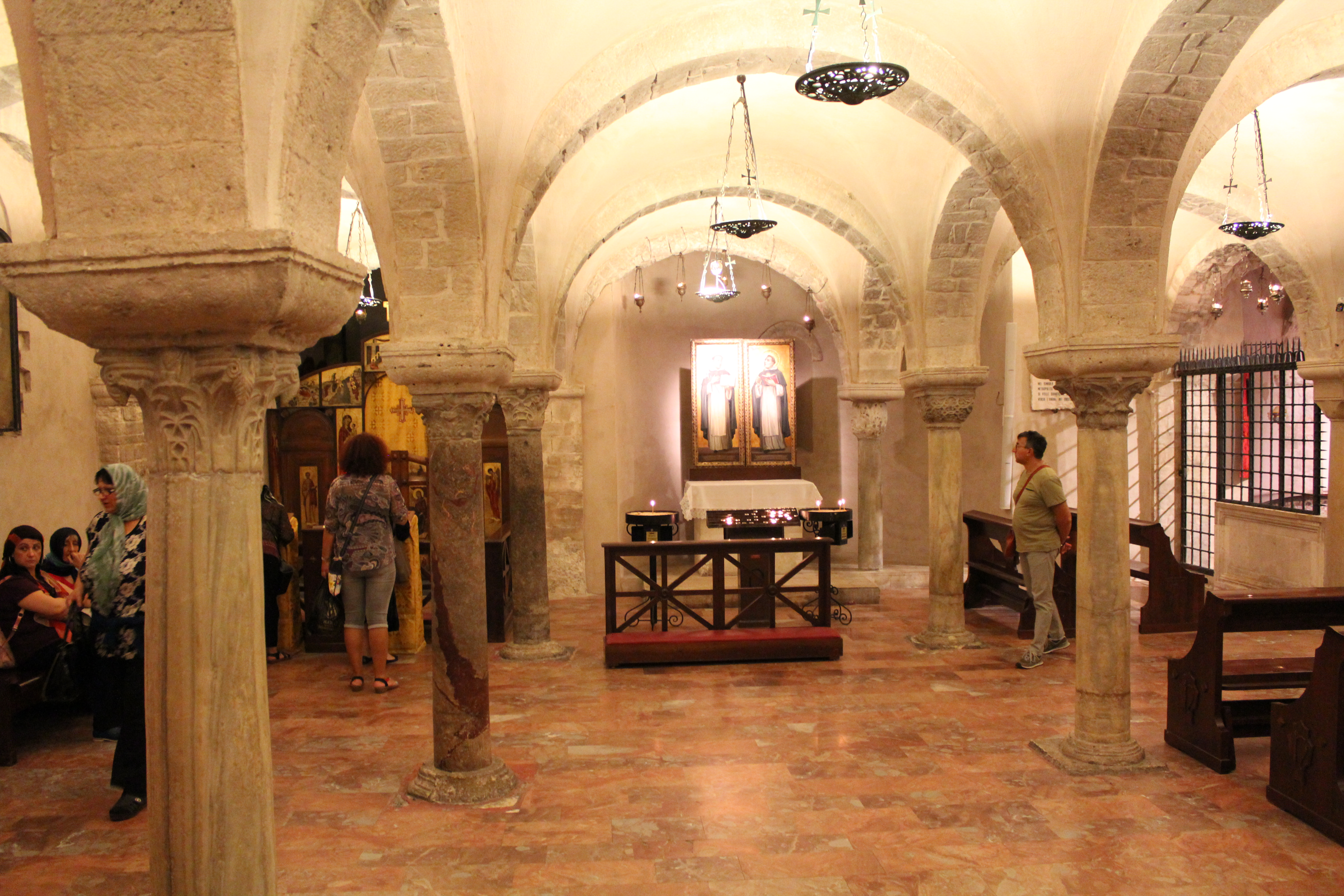 basilica di San Nicola This is a photo of a monument which is part of cultural heritage of Italy.